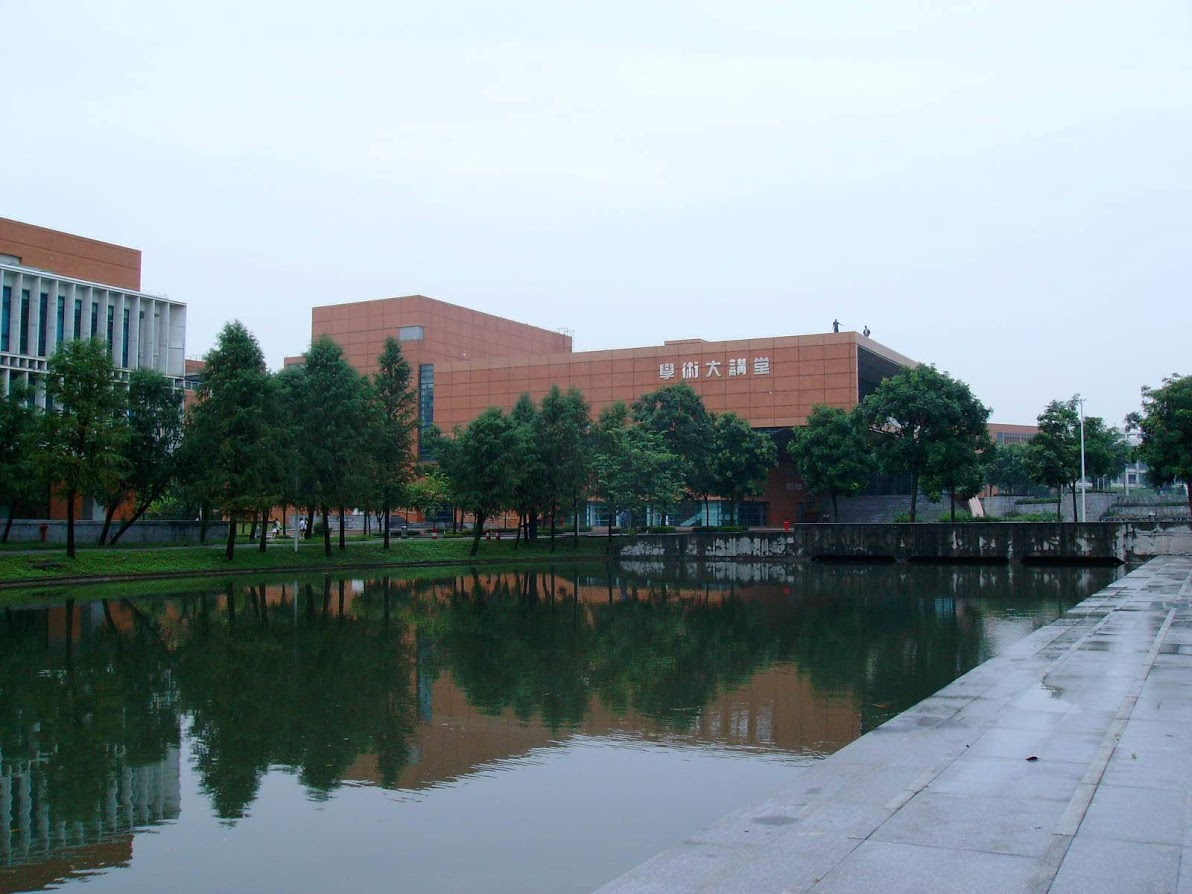 华南理工大学大学城校区学术大讲堂